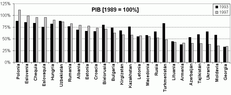 GDP collapse in ex-socialist economies, econ_collapse.png